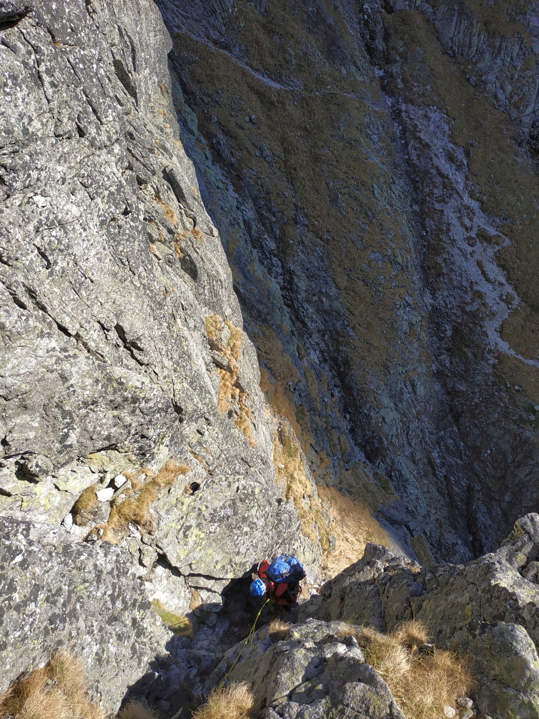 Wyżni Białczański Żleb